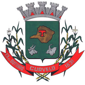 CurveloMG-Basão